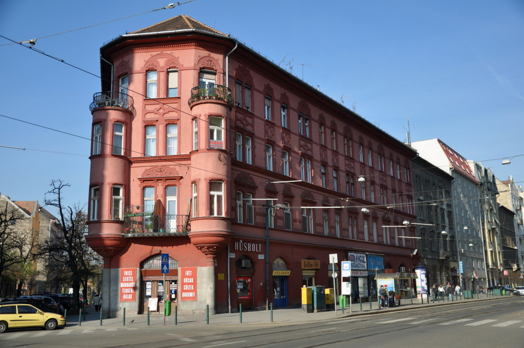 Népszínház Street 59 & Bauer Sándor St. cnr.